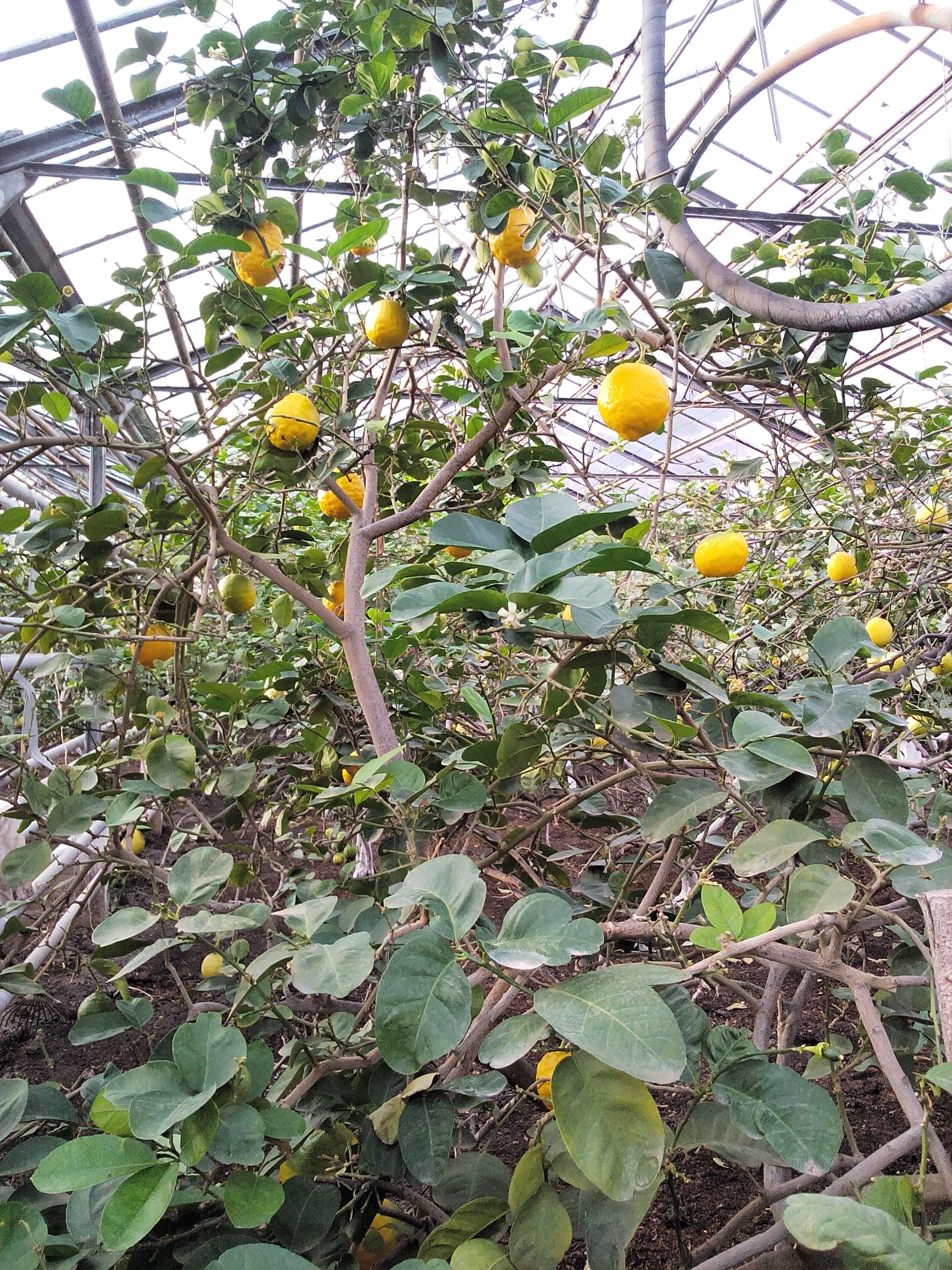 Башҡортса: Өфөләге Лимонарий